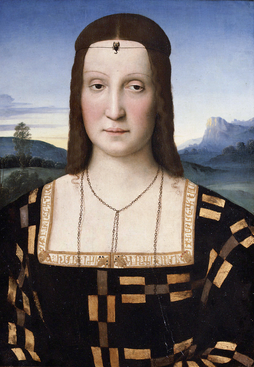 Elisabetta (ca 1471-1526), figlia di Federico I Gonzaga, sposò nel 1489 Guidobaldo I da Montefeltro (1472-1508), duca di Urbino.